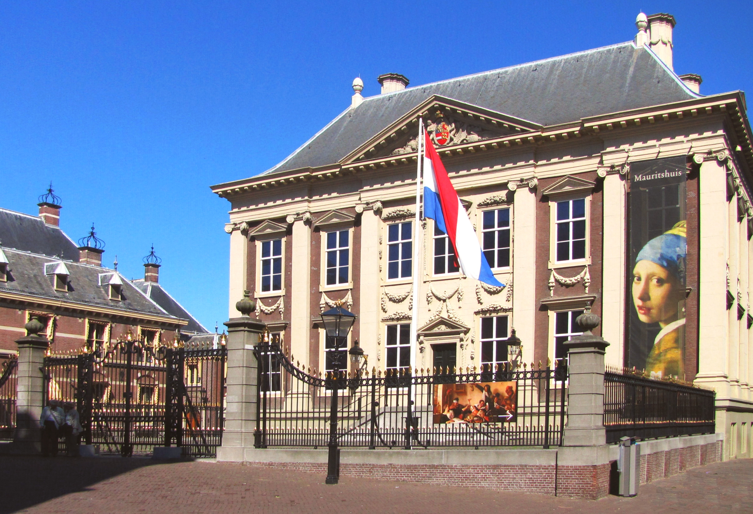 Das Mauritishuis Museum geht zurück auf das Jahr 1822, korrekt: "Koninklijk Kabinet van Schilderijen Mauritshuis", Den Haag Niederlande Foto Wolfgang Pehlemann IMG_1226